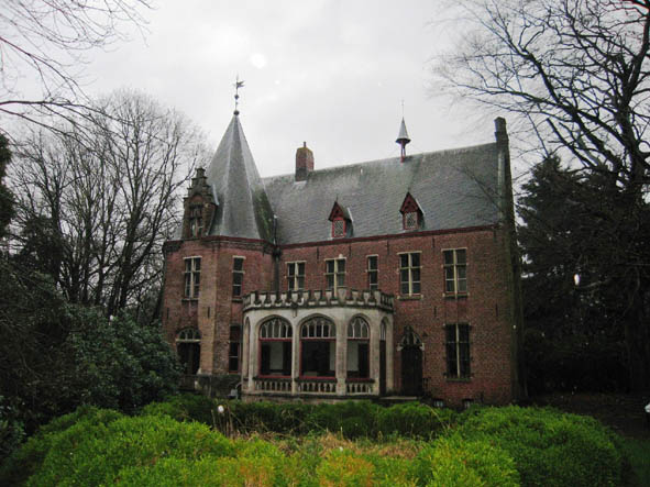 proosdijstraat 1_1